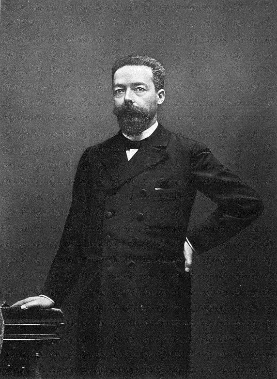 "Paul Doumer, gouverneur général de l'Indo-Chine (1897-1902)".